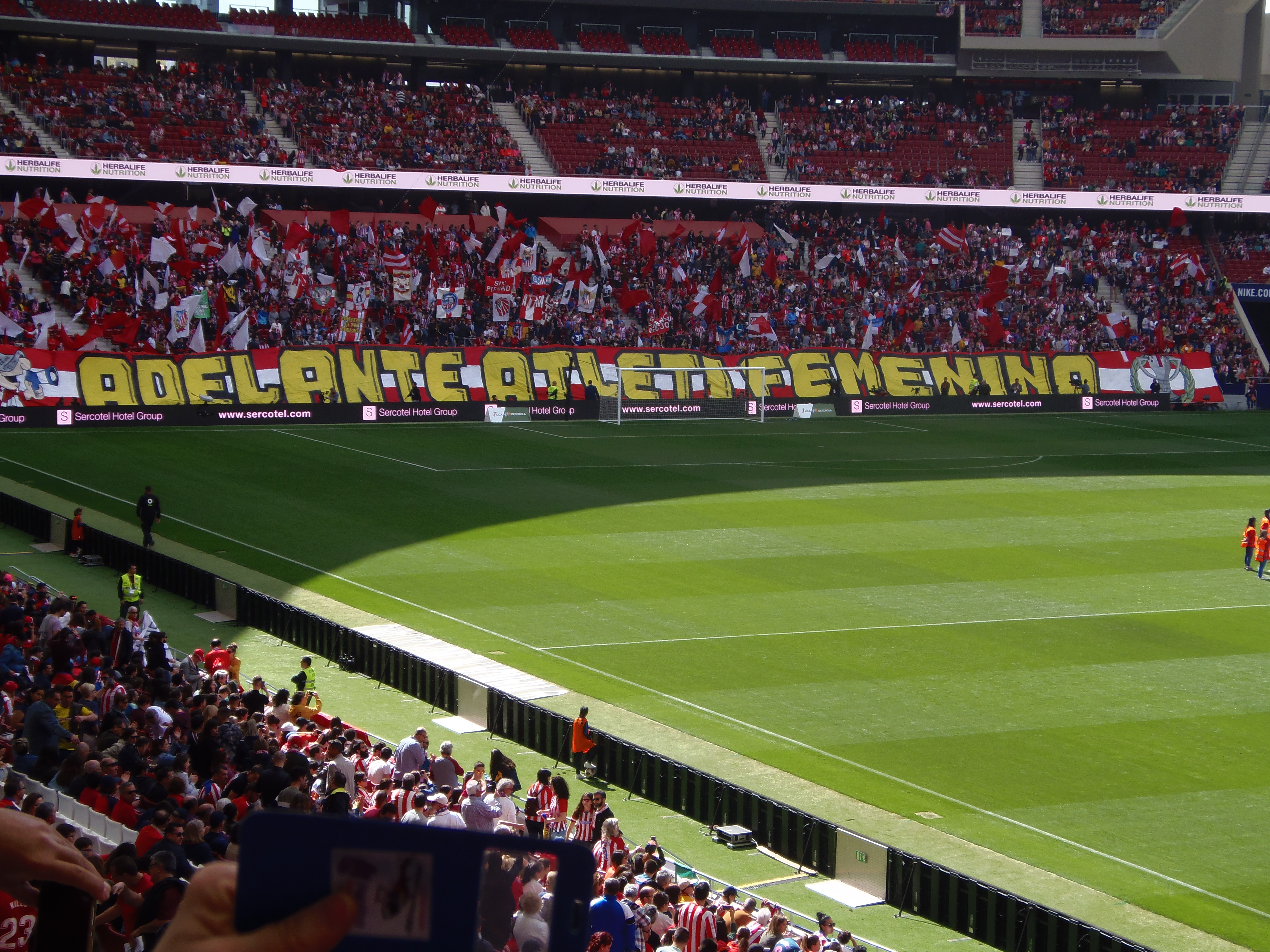 Atletico de Madrid femenino - Barcelona 17 de marzo de 2019